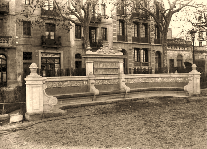 Banco-biblioteca del paseo de San Juan, Barcelona.